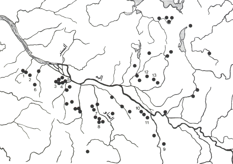 انتشار مقابر اللومبارد في نهر إلبه السفلي.